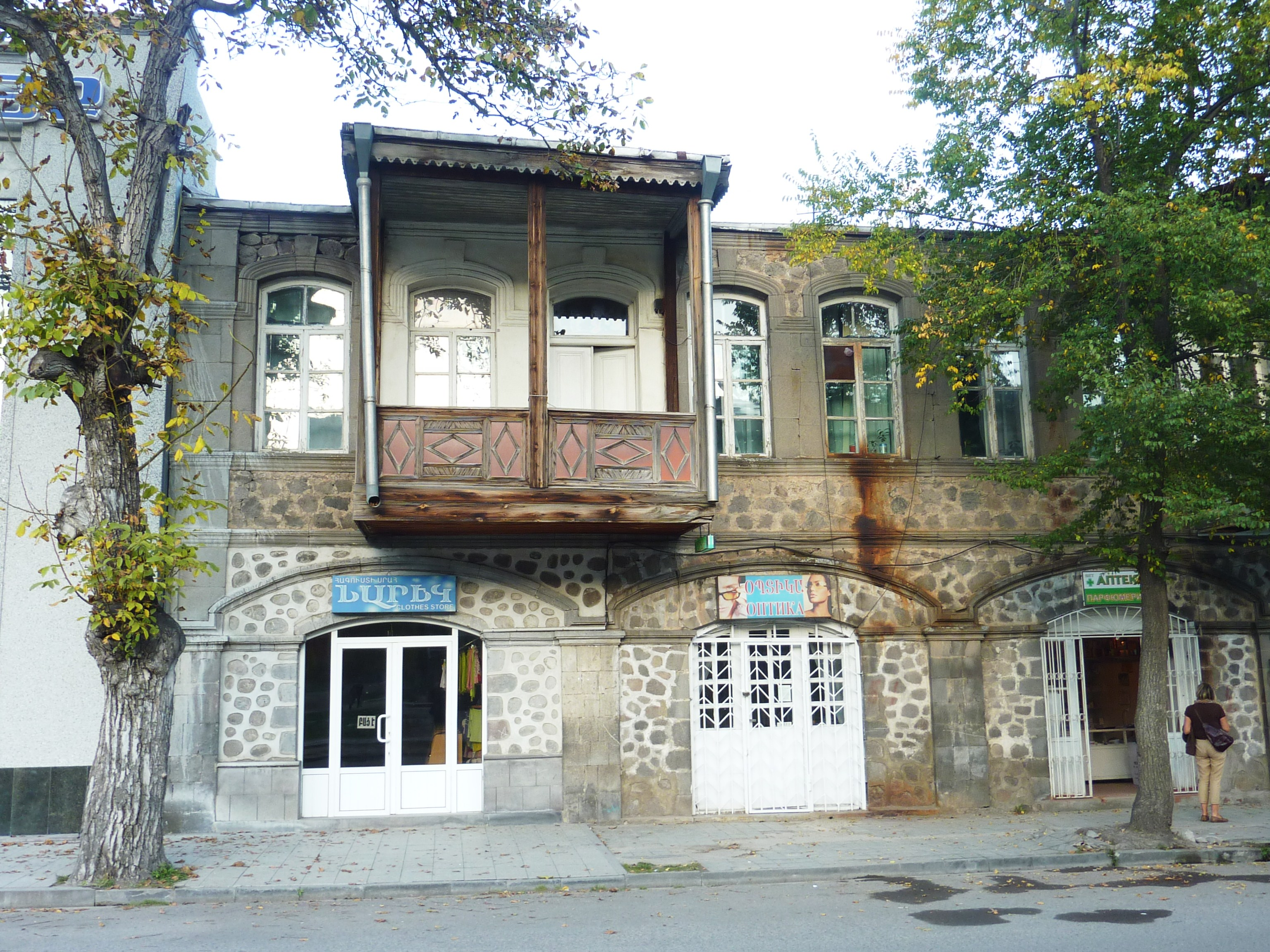 Goris : habitat typique traditionnel